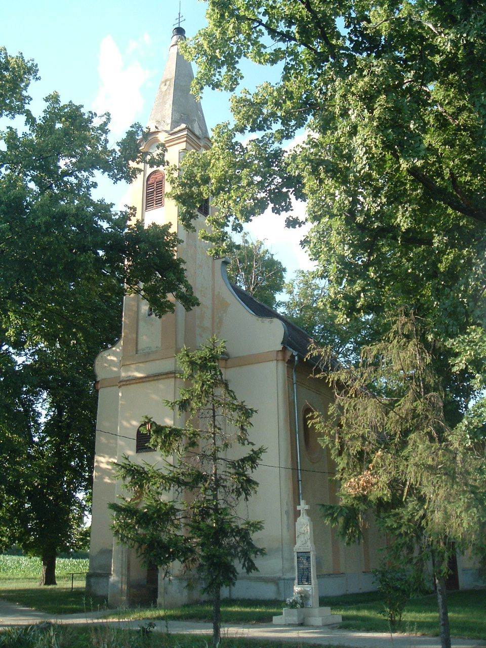 Gyalóka, Hungary